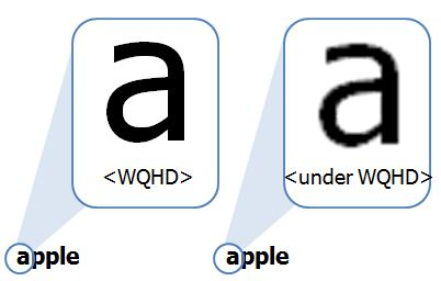 Alphabet a